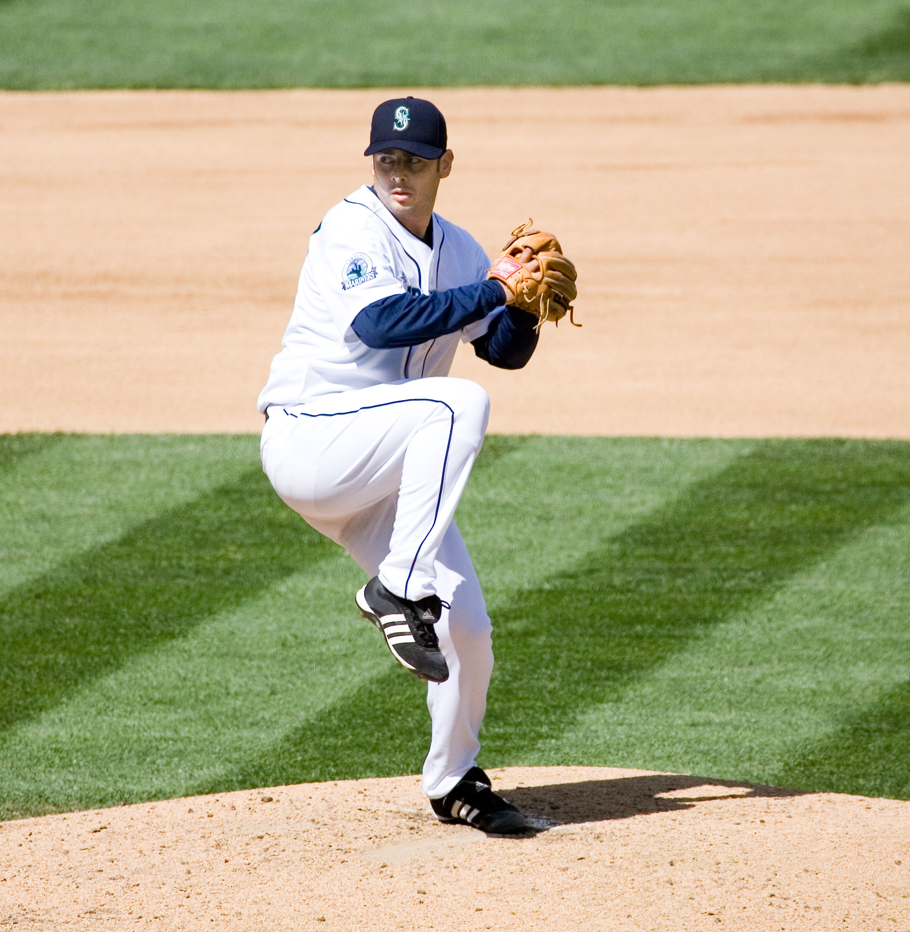 Horacio Ramírez